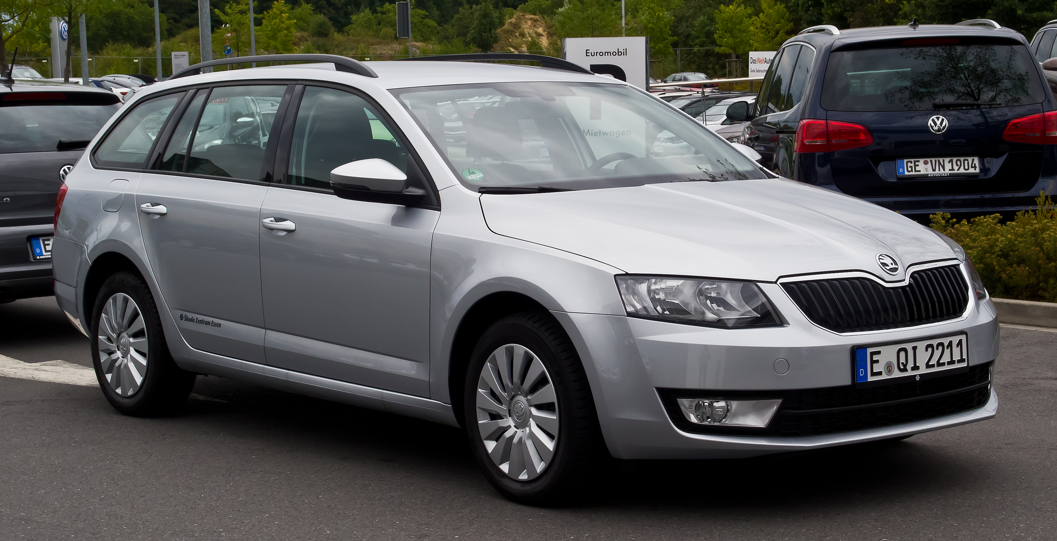 Skoda Octavia Combi 1.6 TDI Ambition (III)